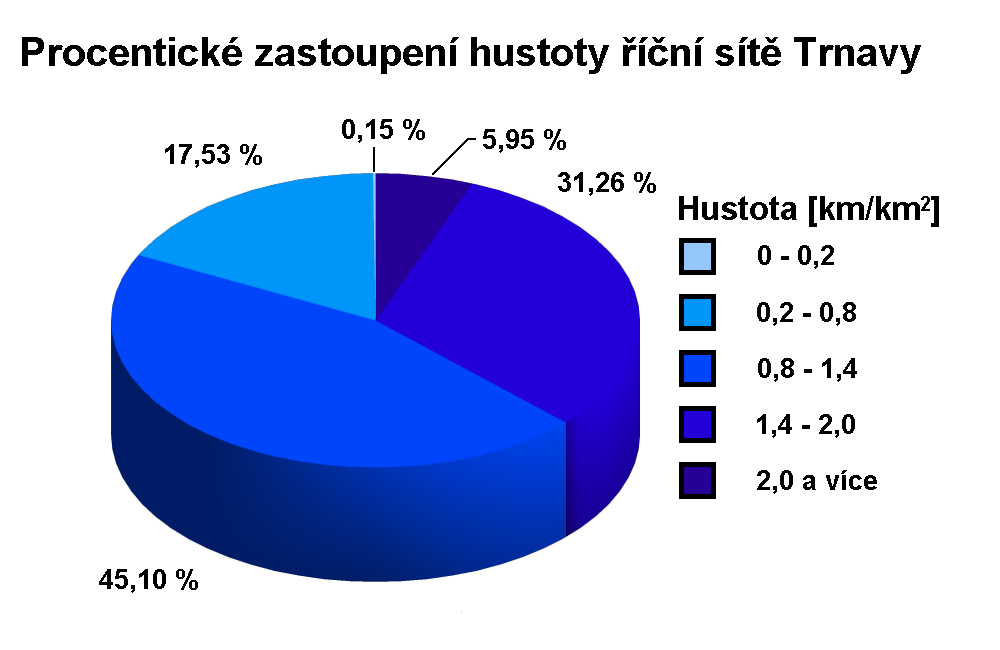 Procentické zastoupení hustoty říční sítě Trnavy